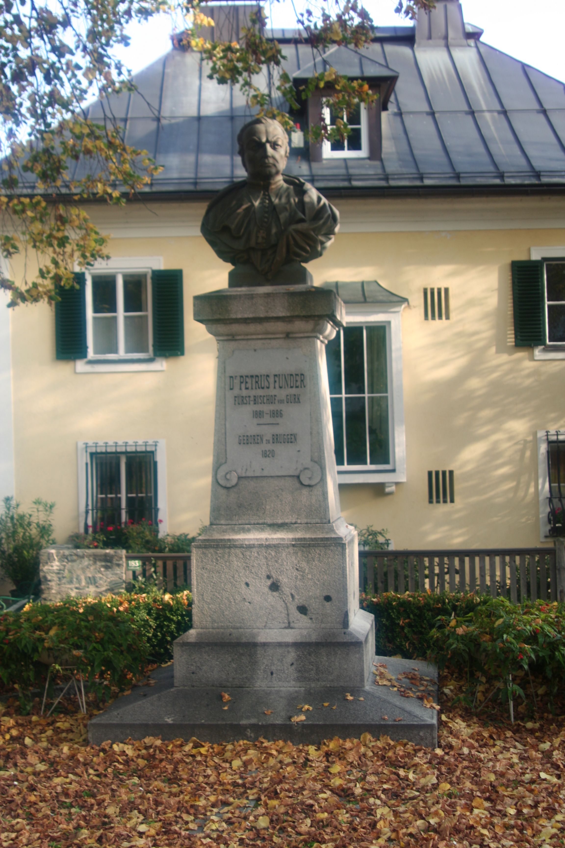 Petrus-Funder-Denkmal in Greifenburg